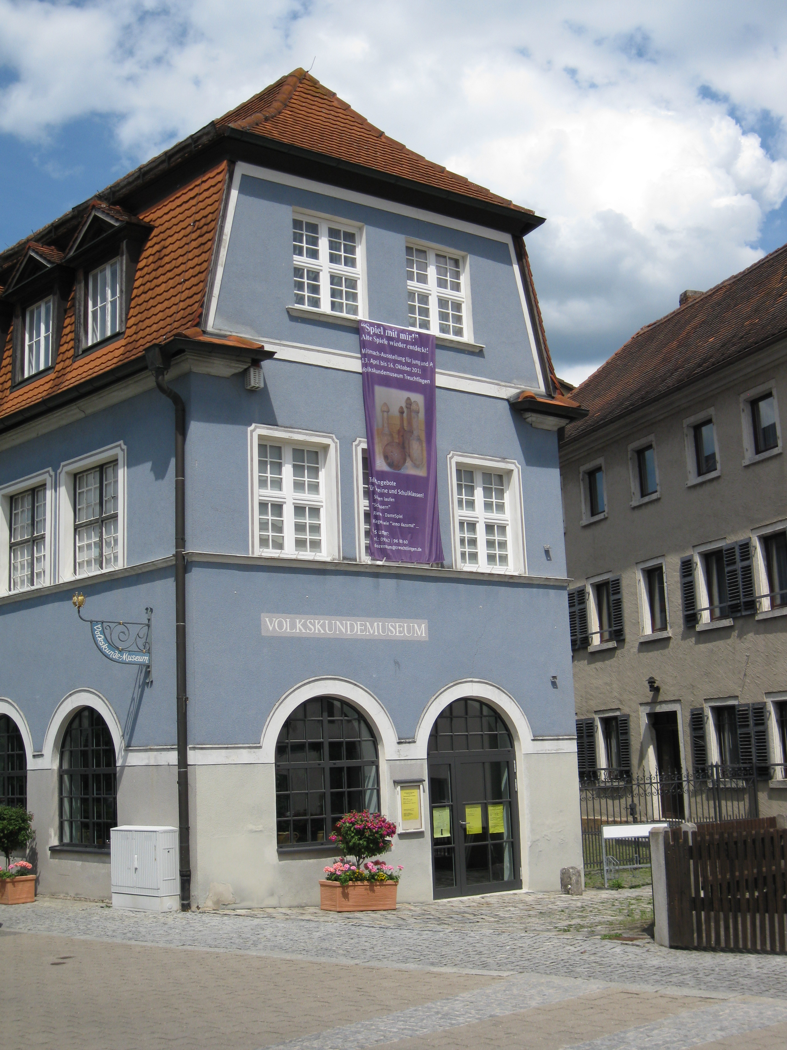 Treuchtlingen